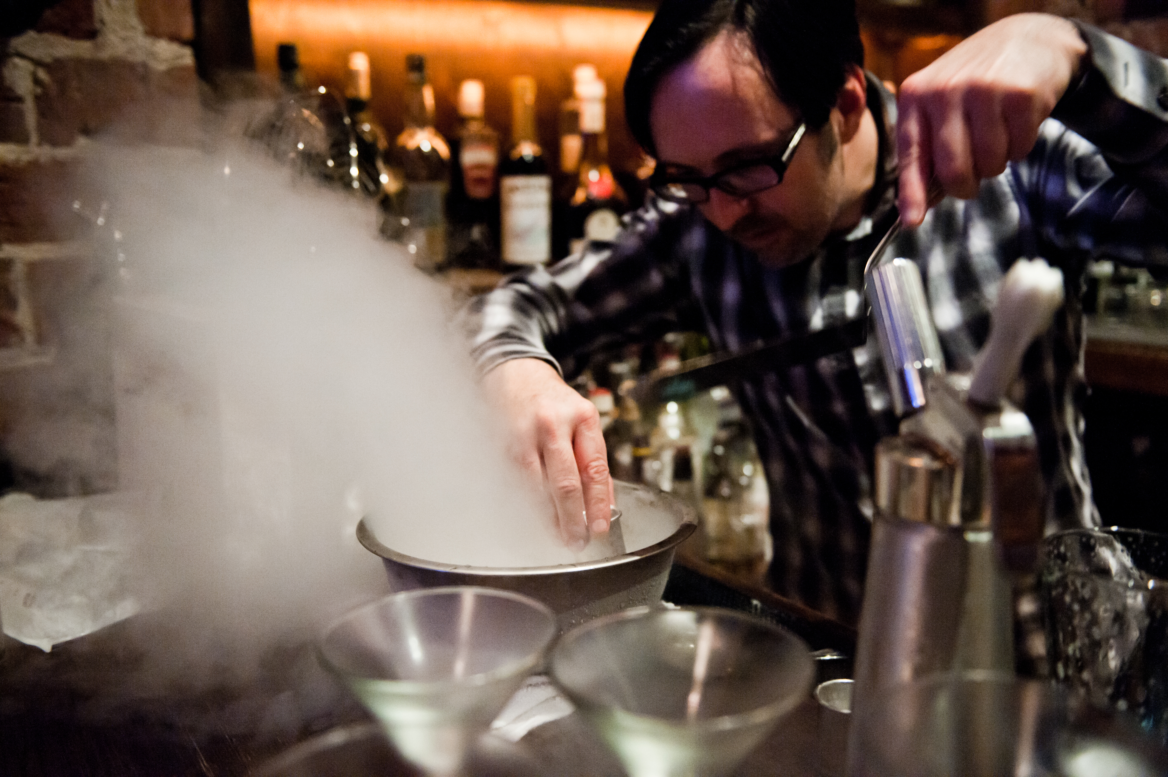 JOH_9342